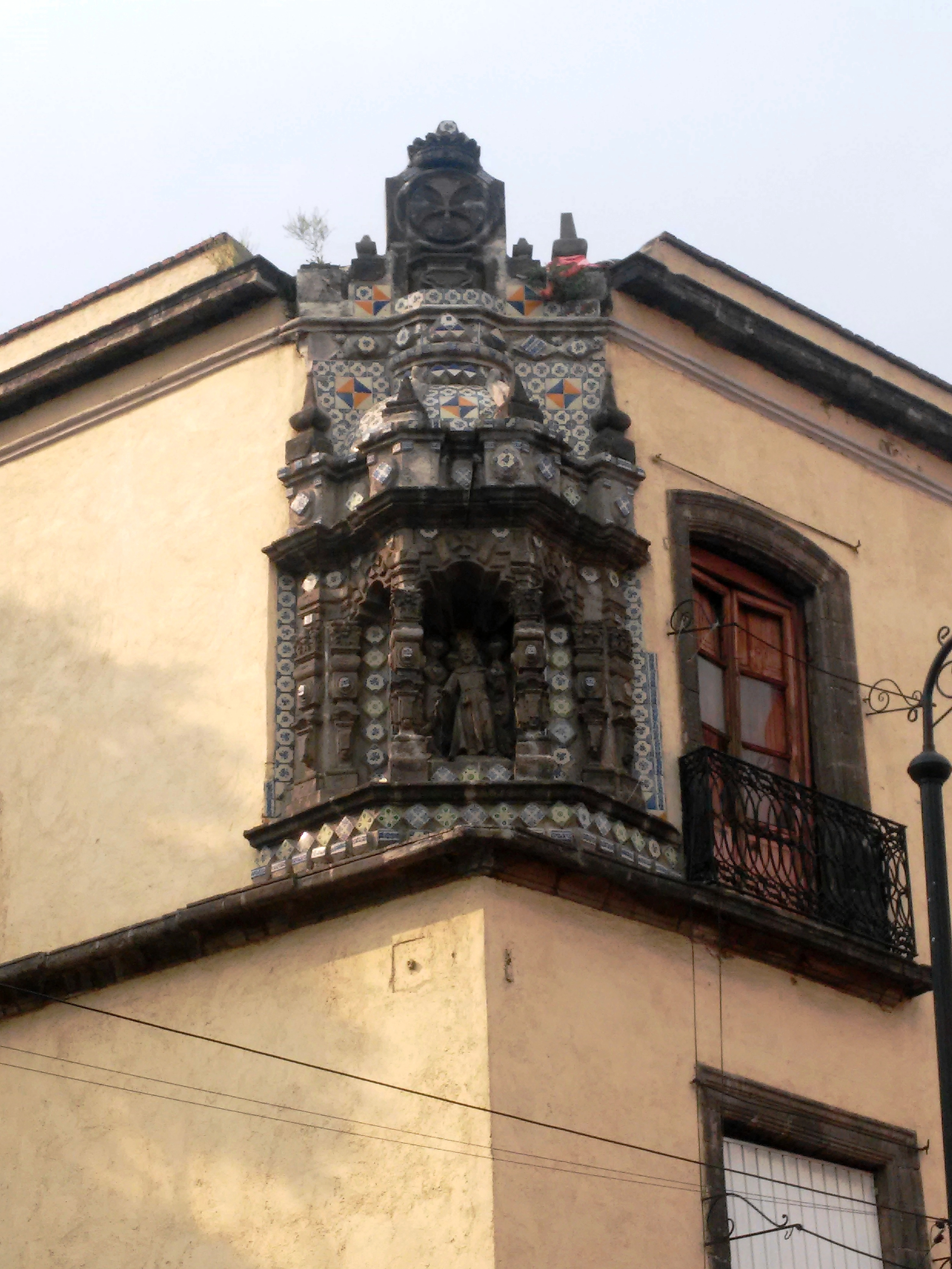 Nicho de San Homobono en la esquina de las calles Brasil y Perú en el barrio de la Lagunilla del centro histórico de la Ciudad de México